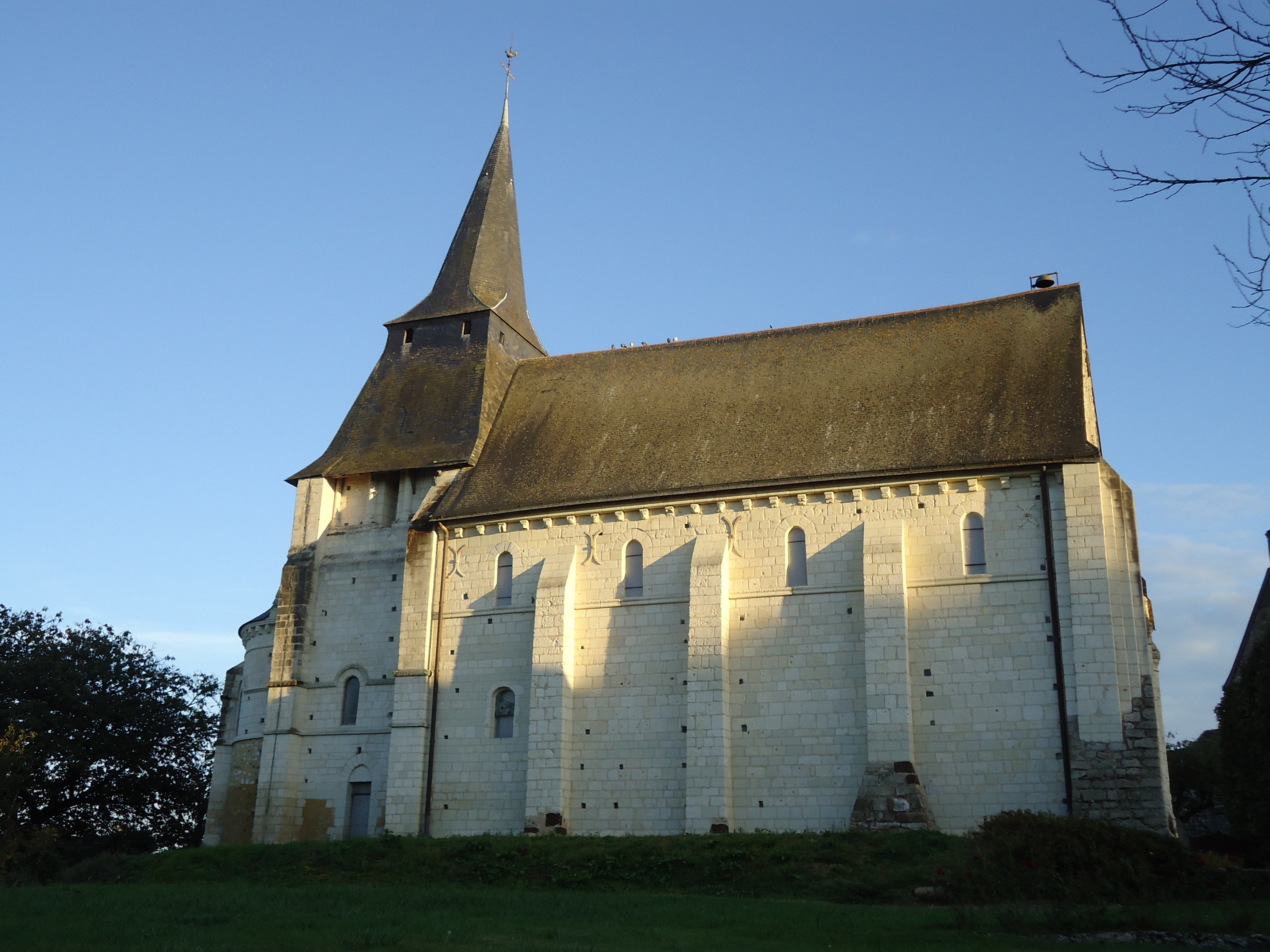 Eglise Saint-Martin - Sarcé - Sarthe (72)